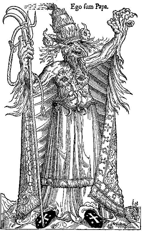 Flugblatt aus der Reformationszeit mit dem Titel „Ego ſum Papa.“ (dt.: Ich bin der Papst.) gegen Papst Alexander VI.